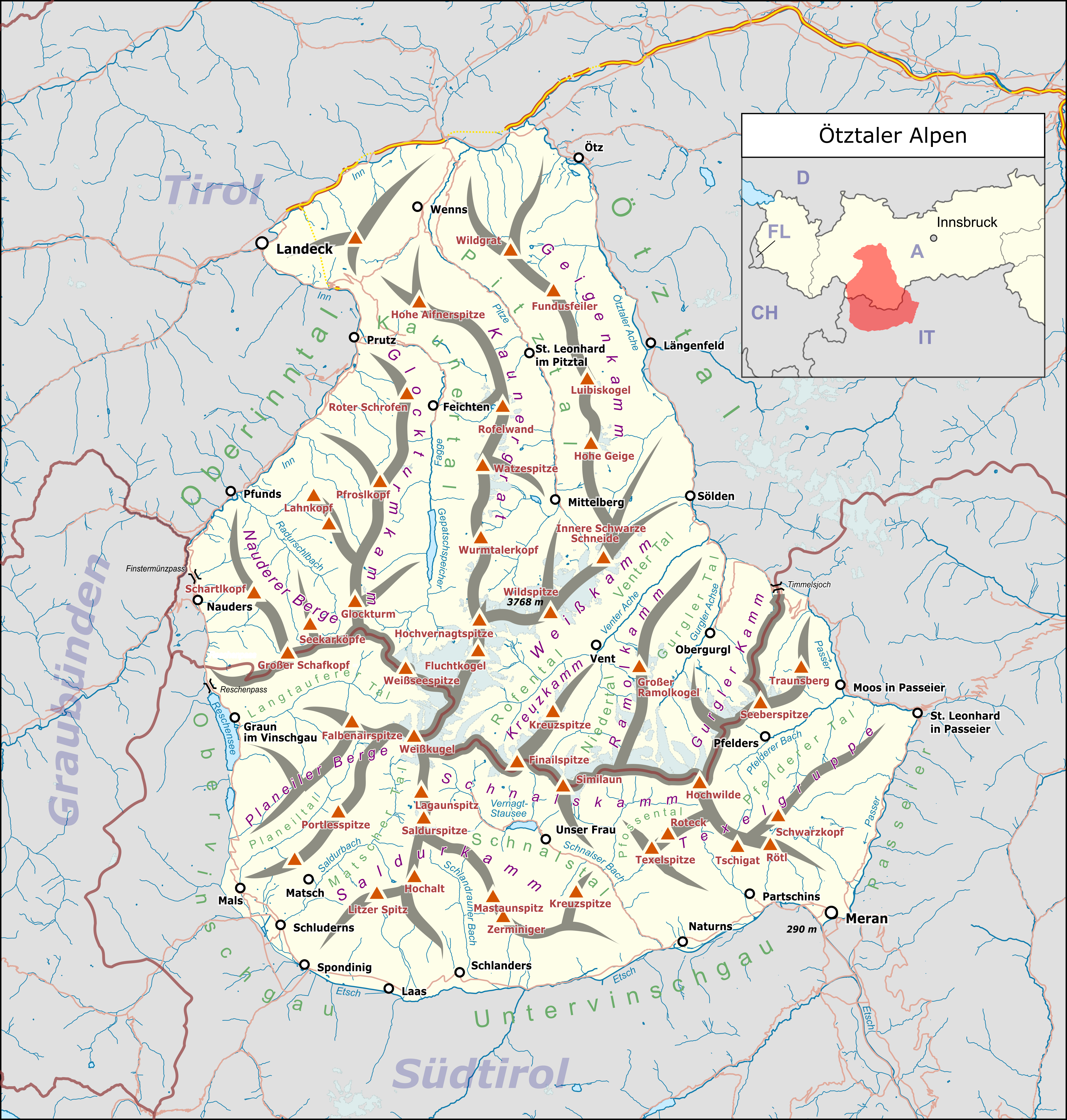 Übersichtskarte der Ötztaler Alpen.